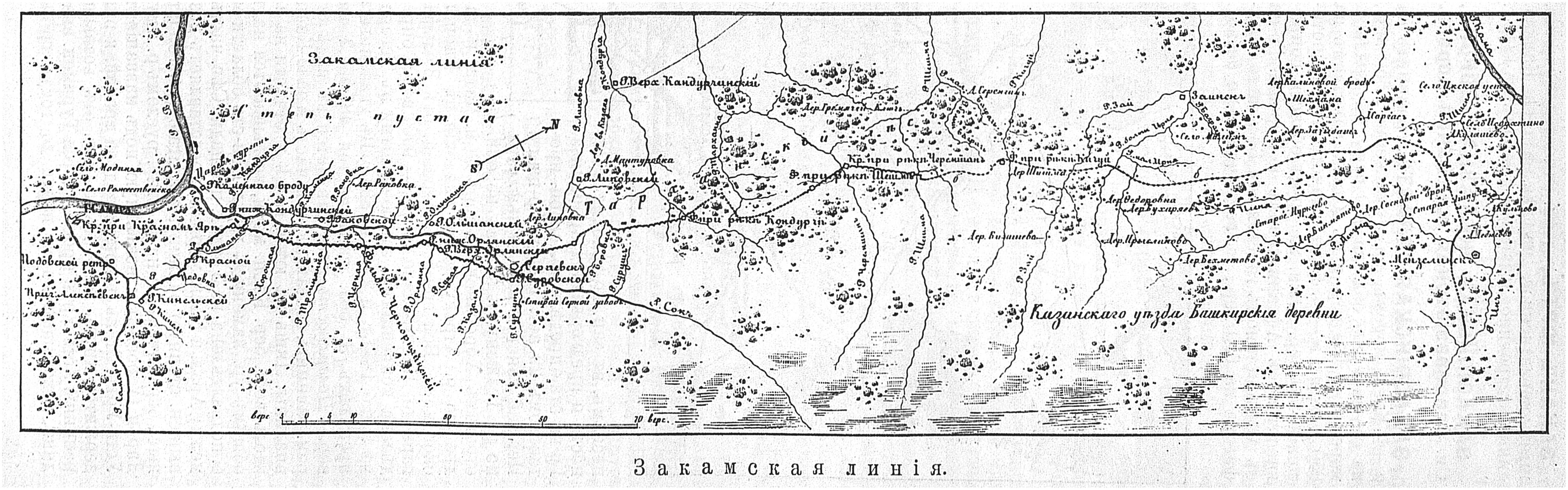 Закамская линия в 1745 году. Это изображение было использовано для иллюстрирования статьи «Закамская линия» опубликованной в десятом томе «Военной энциклопедии», который был издан книгоиздательским товариществом И. Д. Сытина в 1912—1913 гг. в столице Российской империи городе Санкт-Петербурге.